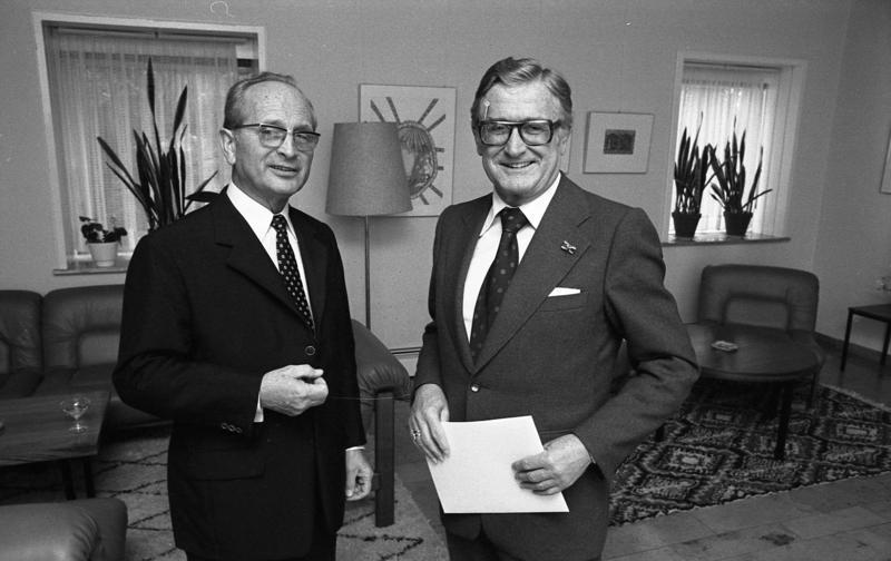 Bundesratspräsident Alfred Kubel empfängt Bundesratsdirektor Albert Pfitzer in der Landesvertretung Niedersachsen (40-jähriges Dienstjubiläum von Pfitzer)